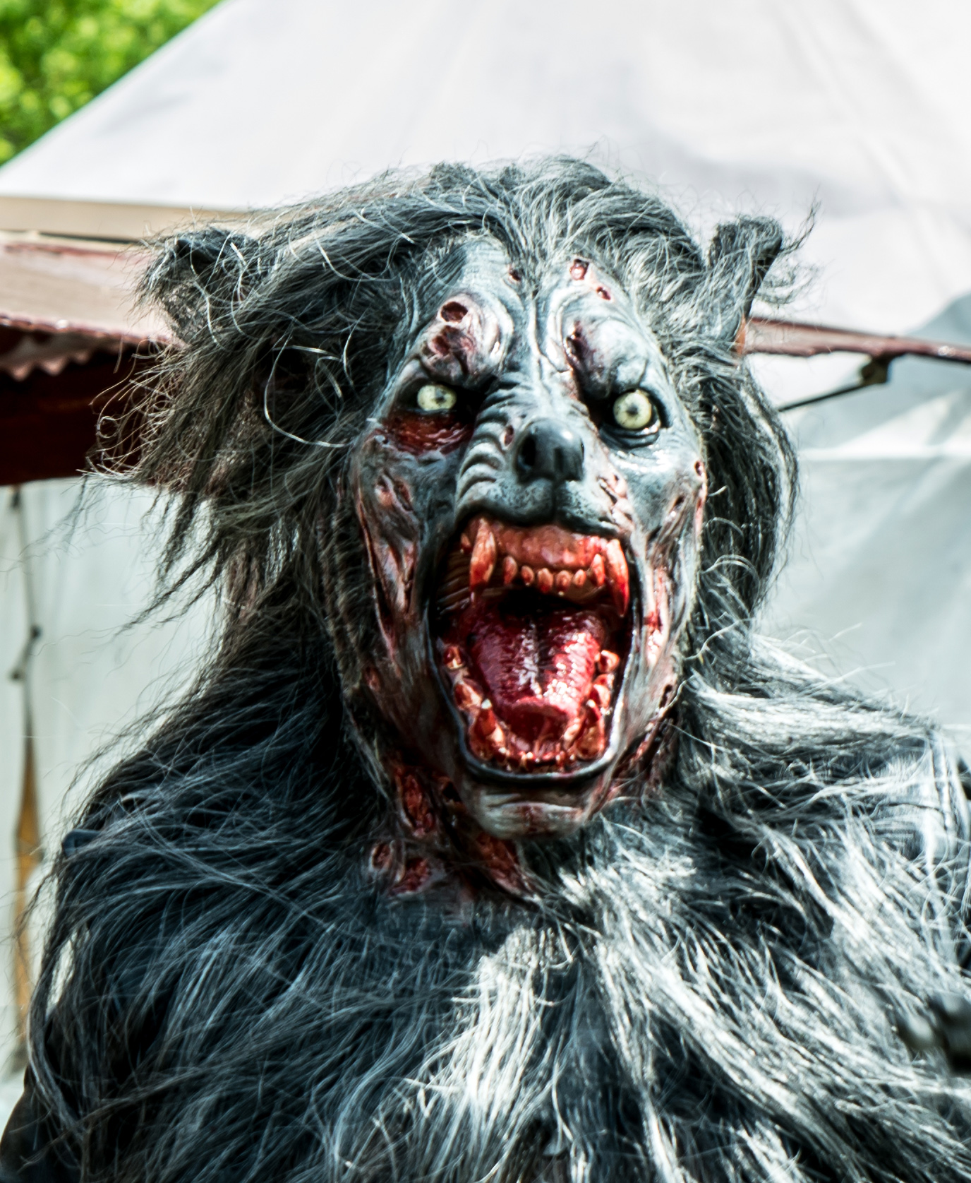 Impressionen vom MPS Hohenwestedt 2016